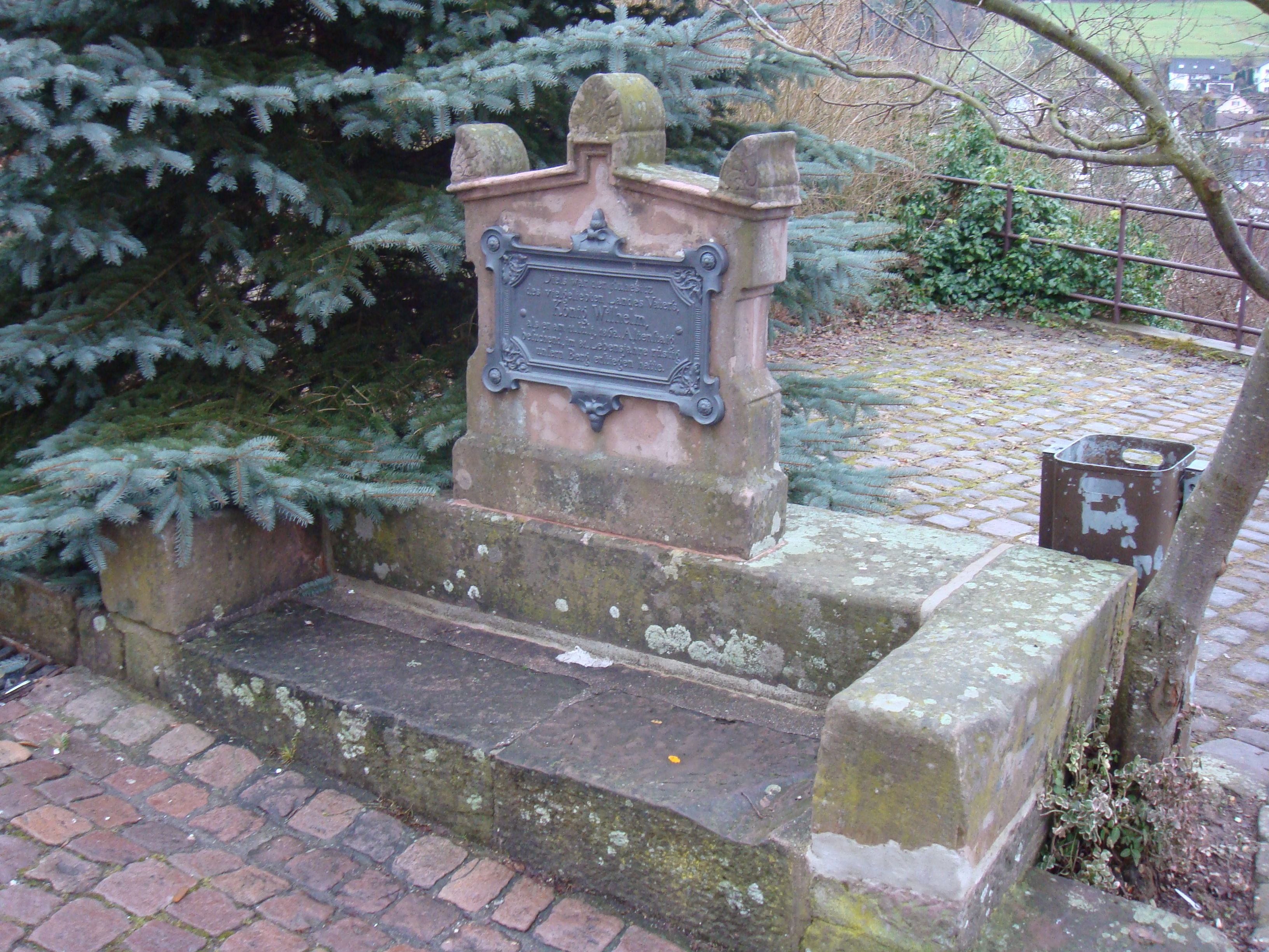 Dies war der Ruhesitz des vielgeliebten Landes Vaters, König Wilhelm, als er am 11. Juli 1862, Altensteig besuchend, im 81. Lebensjahr rüstig unsern Berg erstiegen hatte.